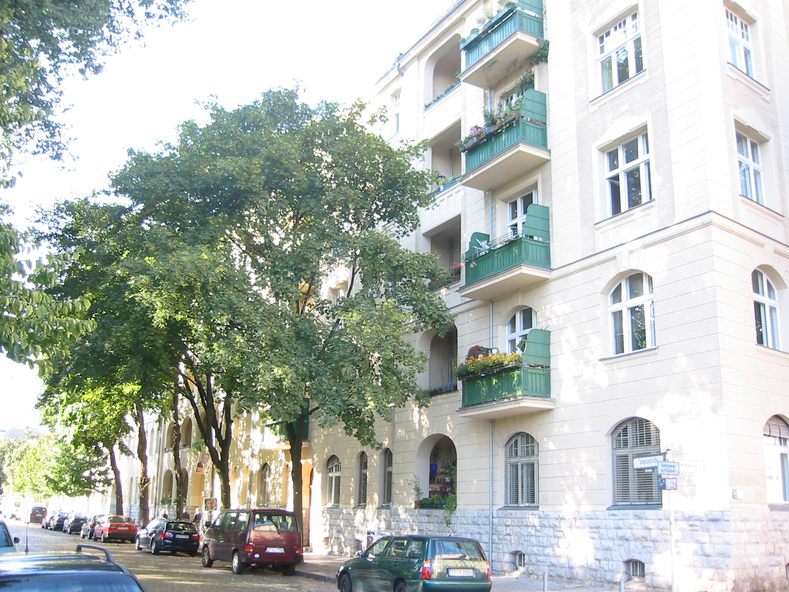 Simplonstraße 6, Berlin.